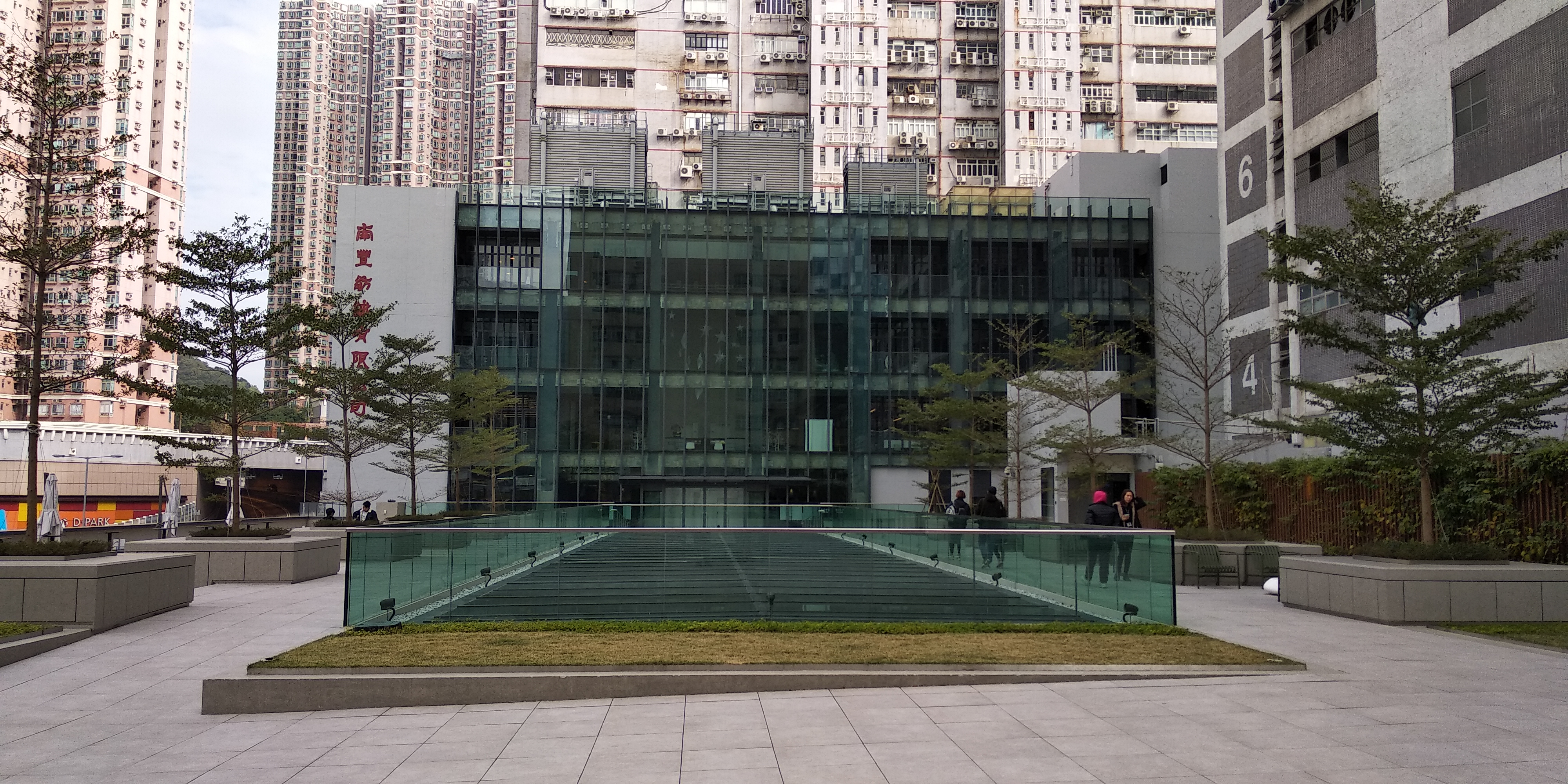 中文（香港）: 南豐紗廠六廠天台紗廠公園。